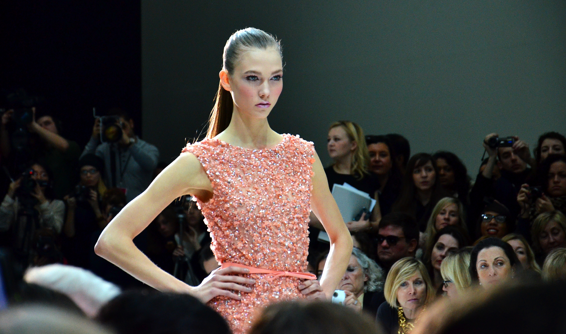 Karlie Kloss in Elie Saab